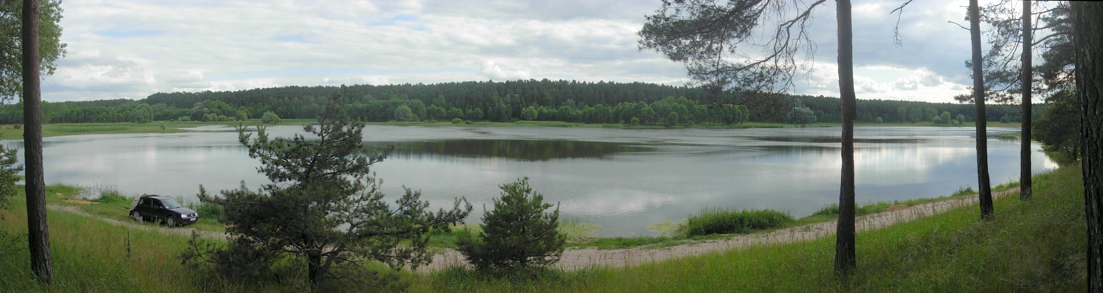 Jezioro Nowe w Puszczy Bydgoskiej koło Gniewkowa